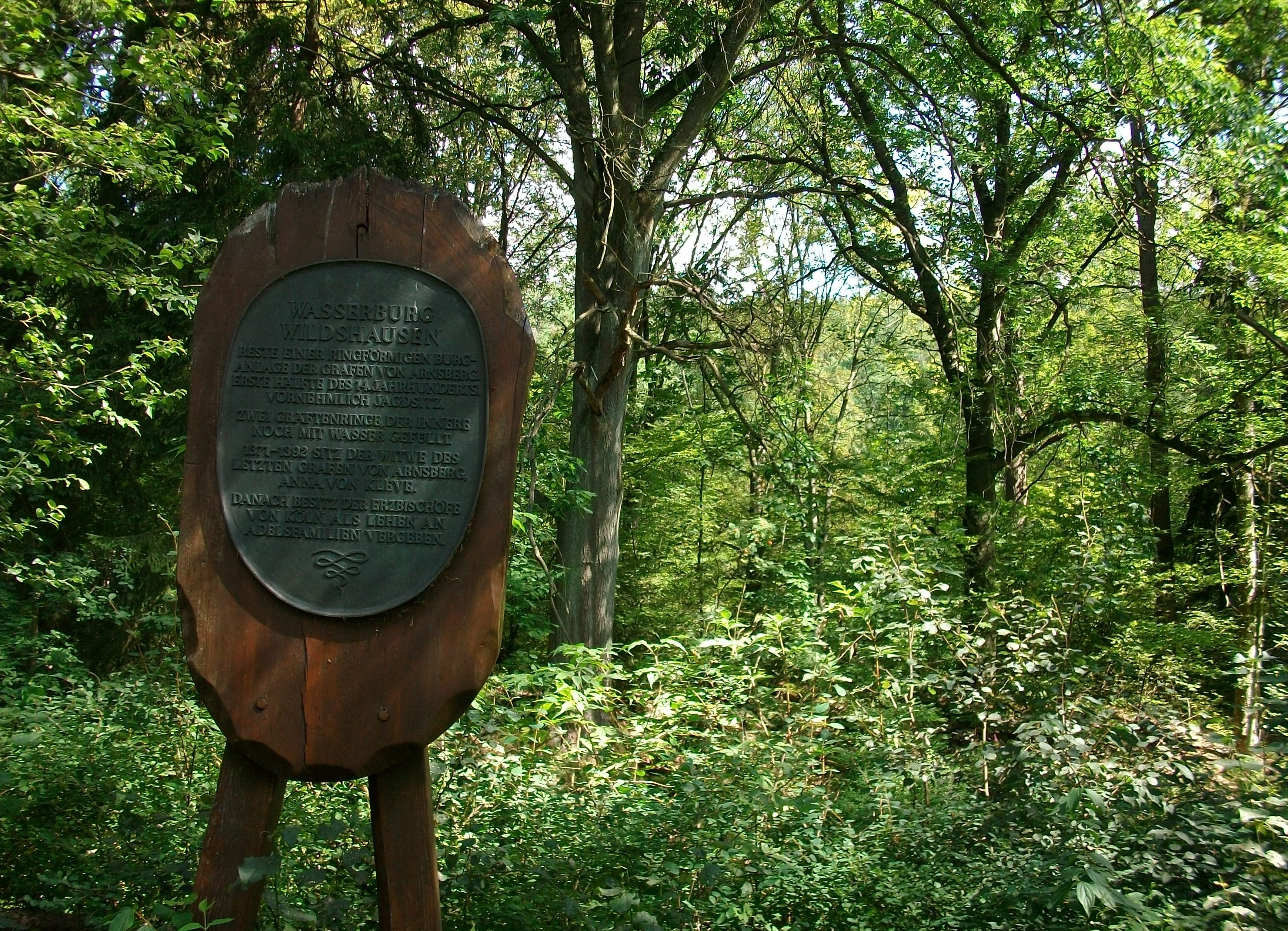 Hinweis ehemalige Wasserburg Wildshausen, Arnsberg (Germany)